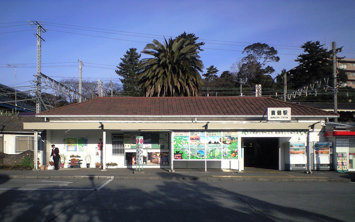 神奈川県足柄下郡真鶴町真鶴、JR東日本東海道本線真鶴駅、駅本屋